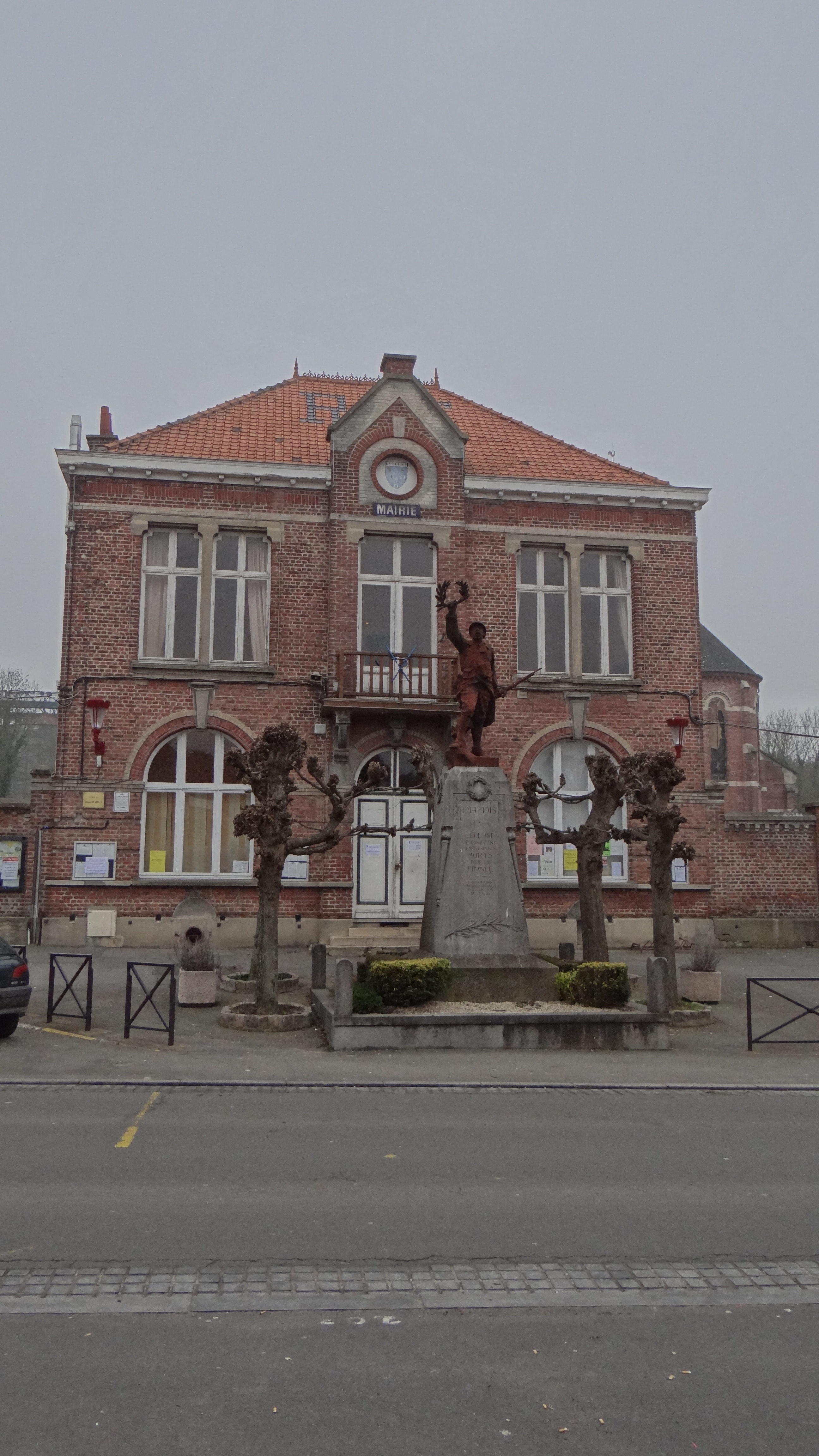 Lécluse - La Mairie